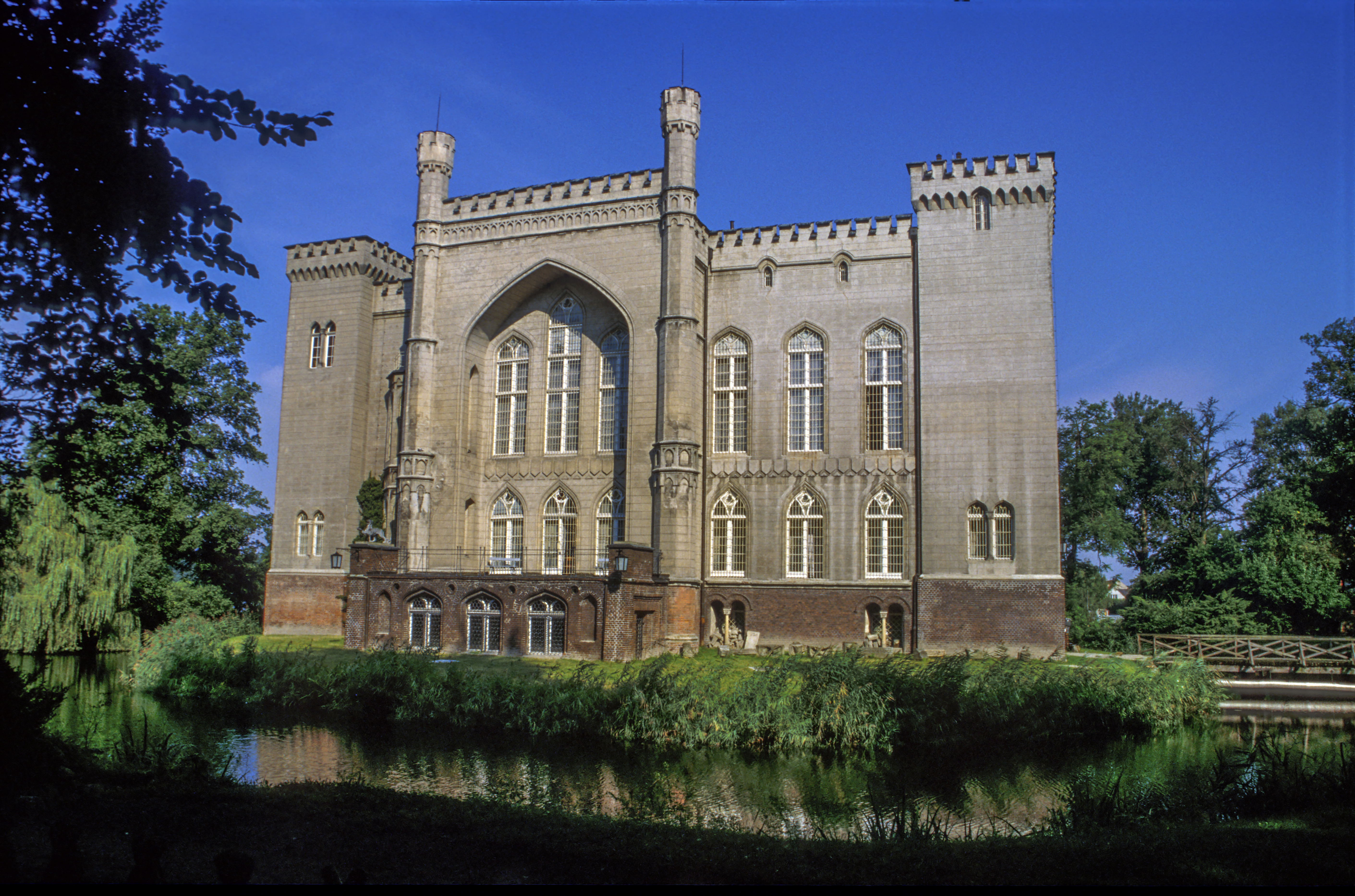 Kórnik